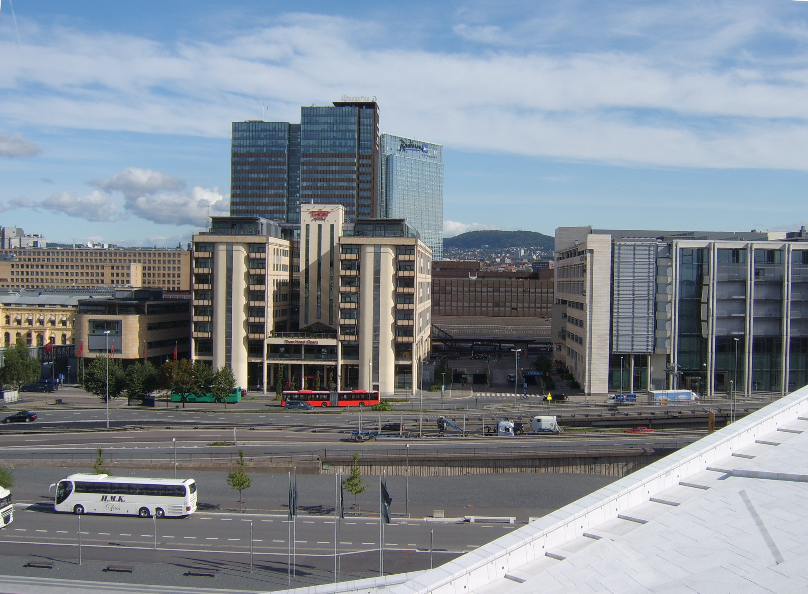 Oslo, Norway